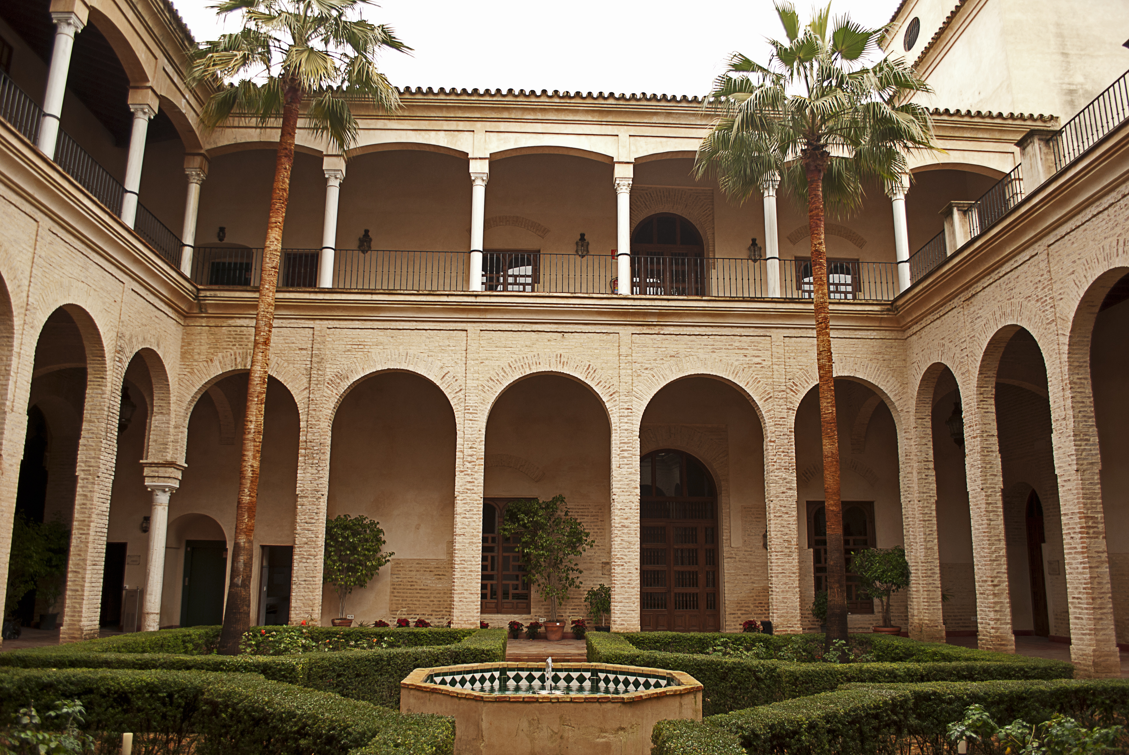 Palacio de los marqueses de la Algaba. Sevilla (Estilo gótico-mudéjar)